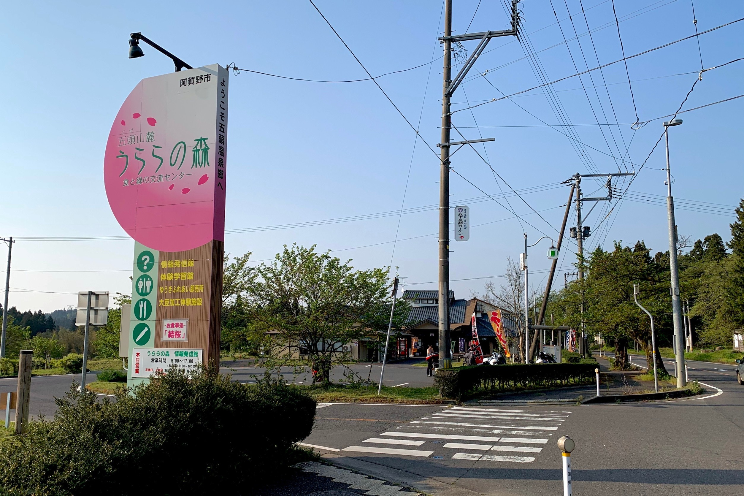 五頭山麓 うららの森（新潟県阿賀野市，2020年5月）